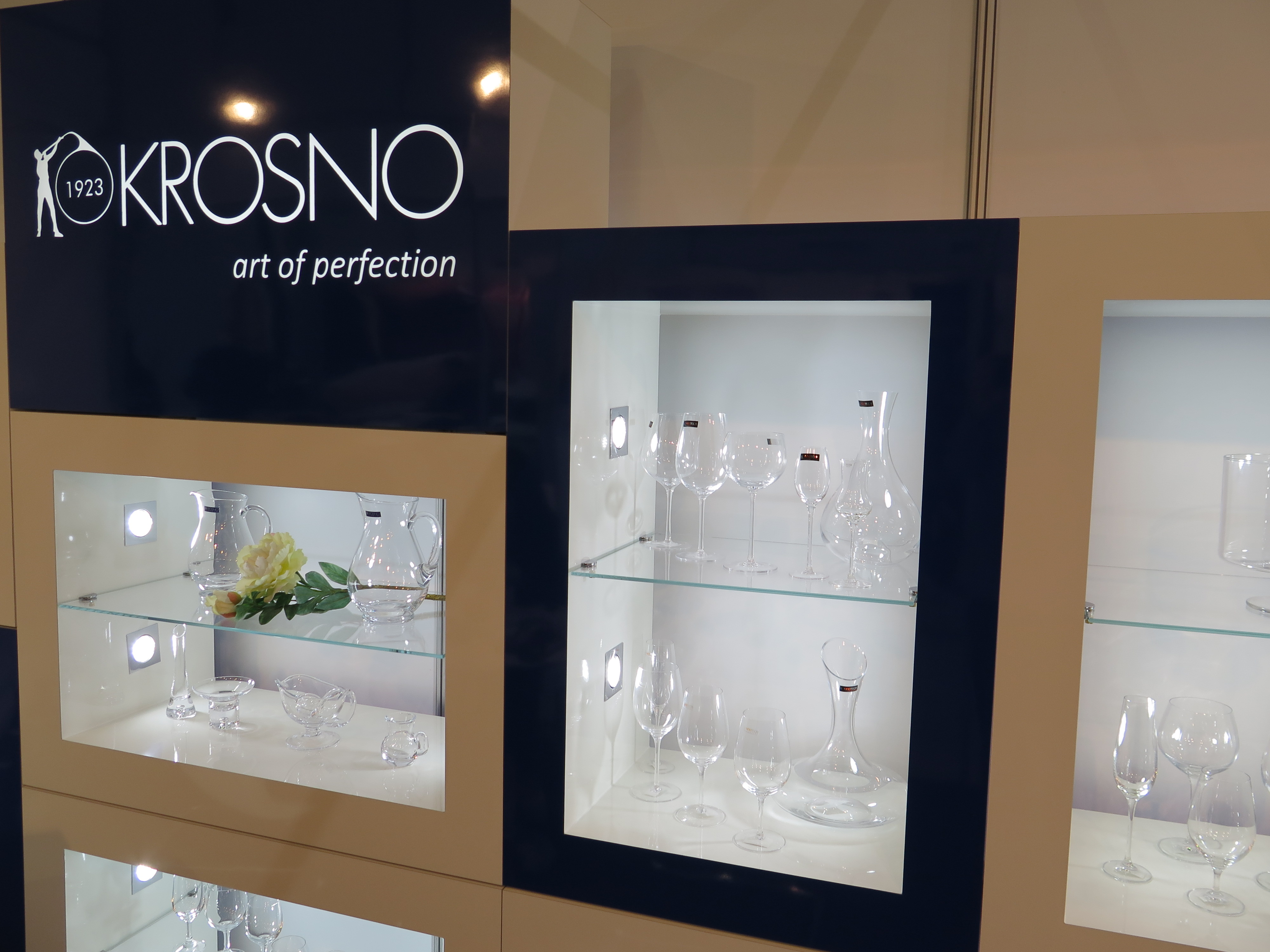 Szkło gastronomiczne "KROSNO" podczas HORECA 2014 w Krakowie